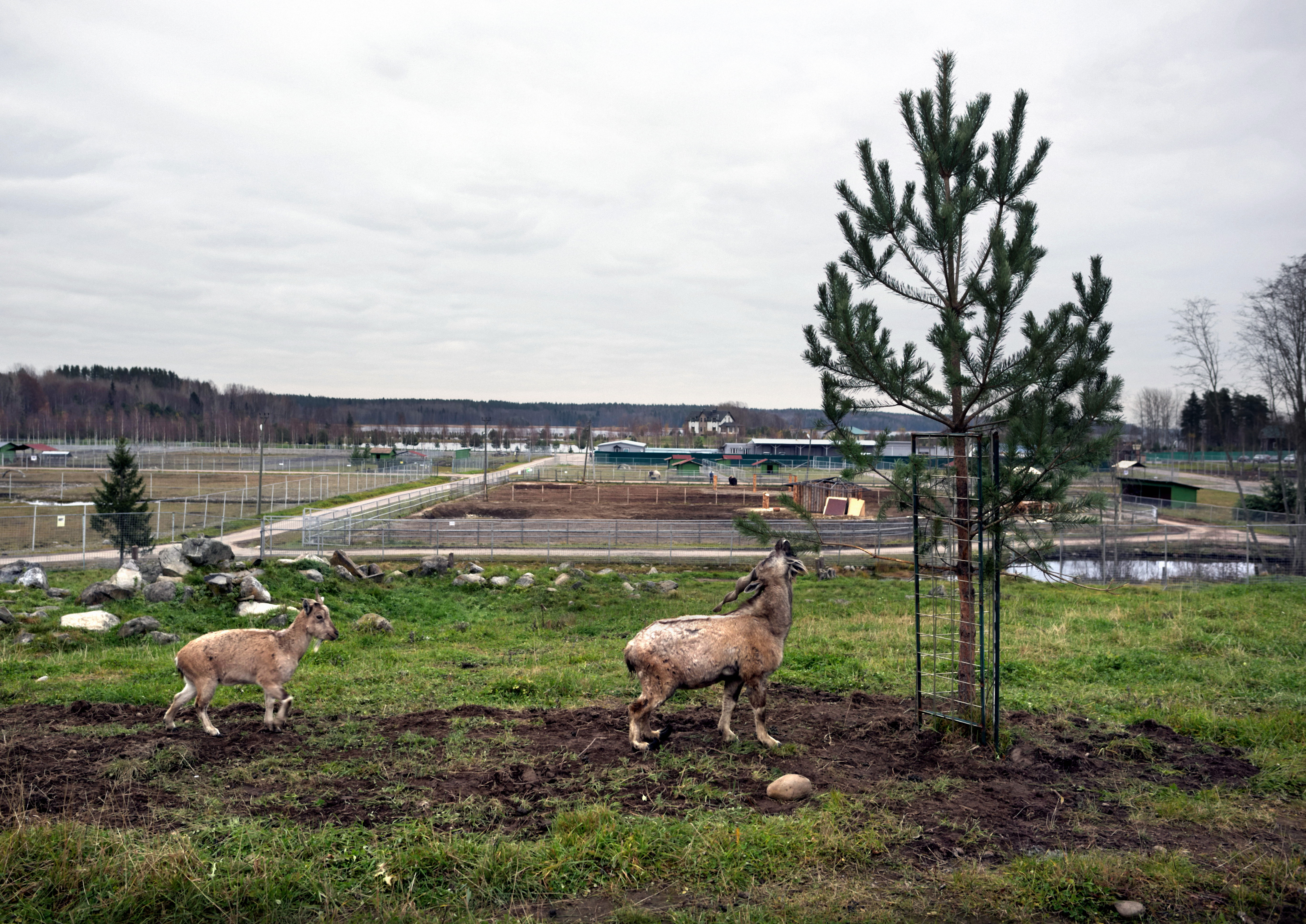 Ruskealan "Zoo Park" 22.10.2016, sijaitsee "Mustat kivet" -lomakeskuksen yhteydessä.